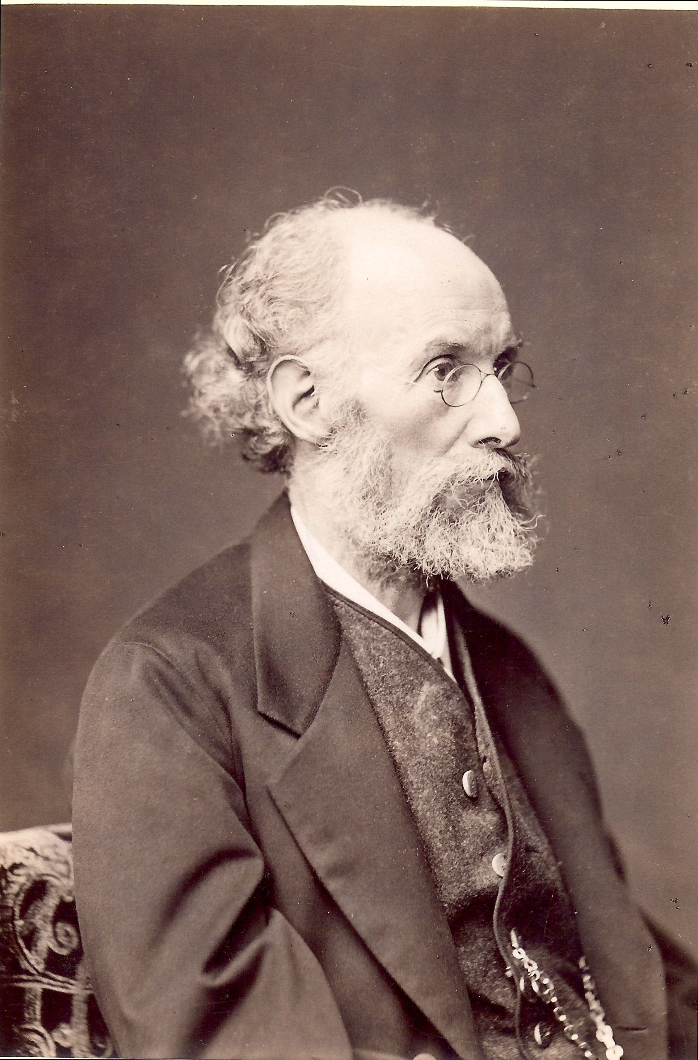 Portraitfoto des Ludwig Des Coudres um 1876